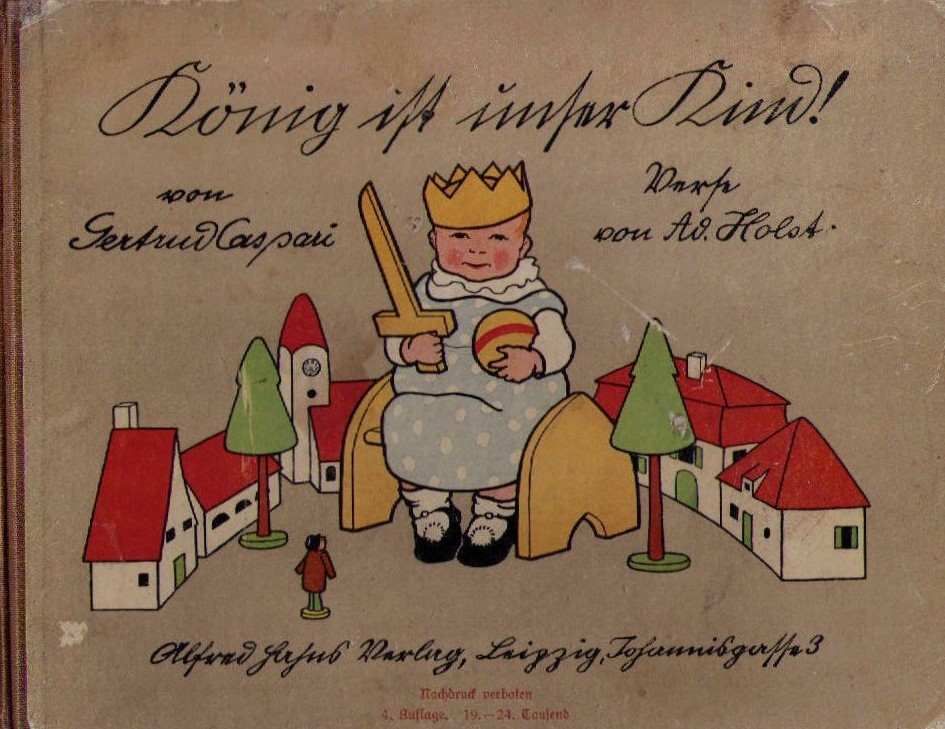 Gertrud Caspari: König ist unser Kind!. Verse von Adolf Holst, Leipzig, Alfred Hahn Verlag, Leipzig, 4. Auflage 1915